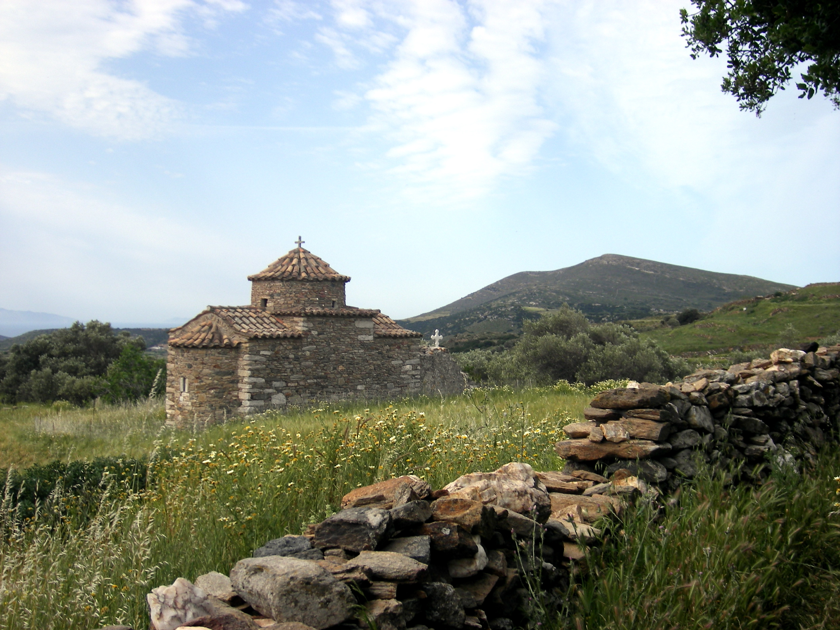 Aghios Nikolaos, Sagri, Naxos